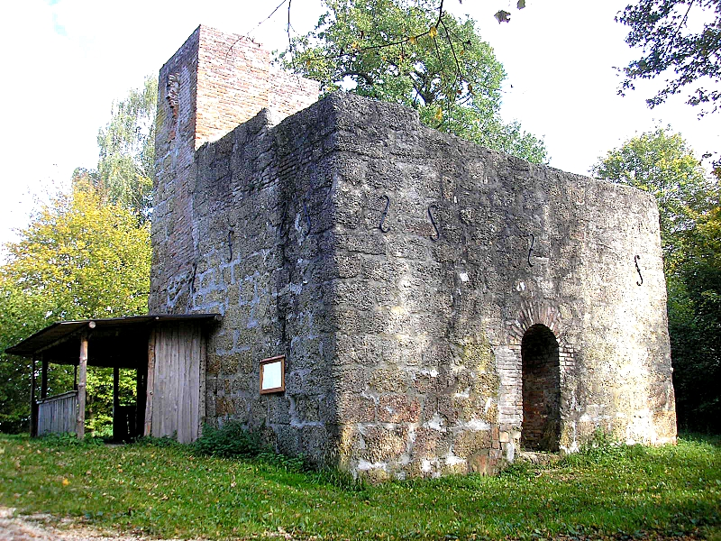 Burg Bocksberg (Bocksberg, Gemeinde Laugna, Bayerisch-Schwaben). Die Ruine des Bergfriedes. Eigene Aufnahme, Sept. 2007 / Bocksberg castle near Laugna (Bavaria, Germany). The ruins of the keep. Own photo, Sept. 2007